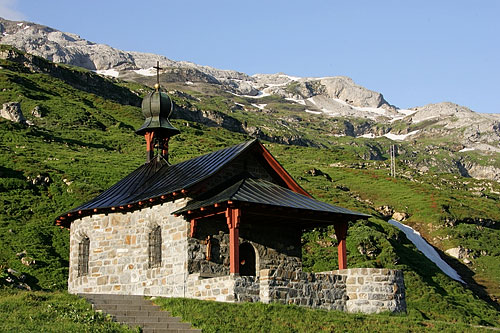 Kapelle auf der Passhöhe (Klausenpass)